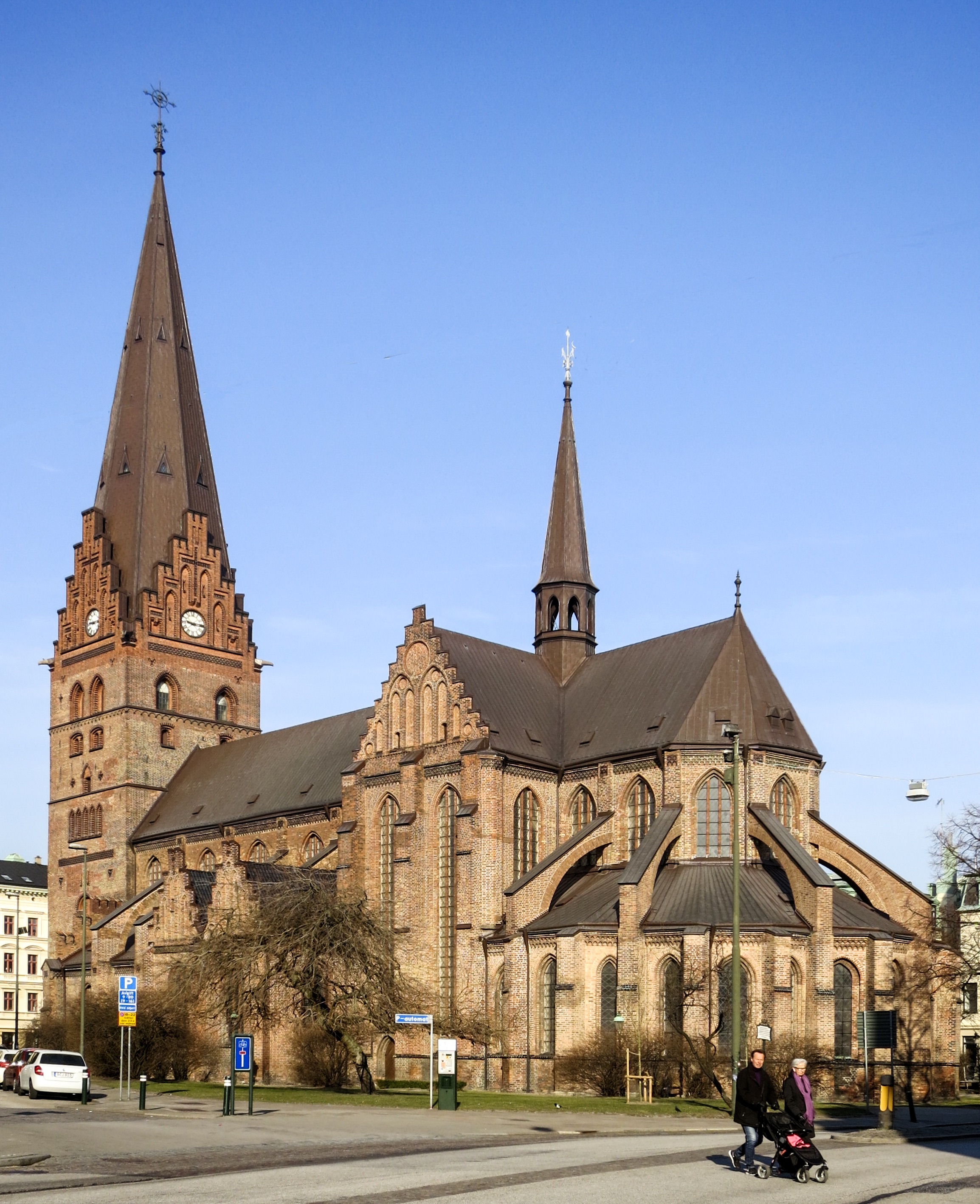 Sankt Petri kyrka, Malmö, mars 2015